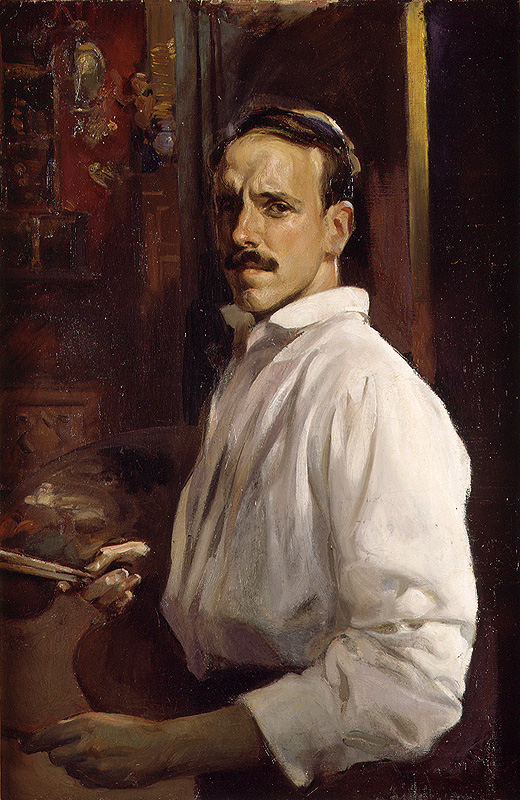 Autorretrato del pintor español José Benlliure y Ortiz (1884-1916).